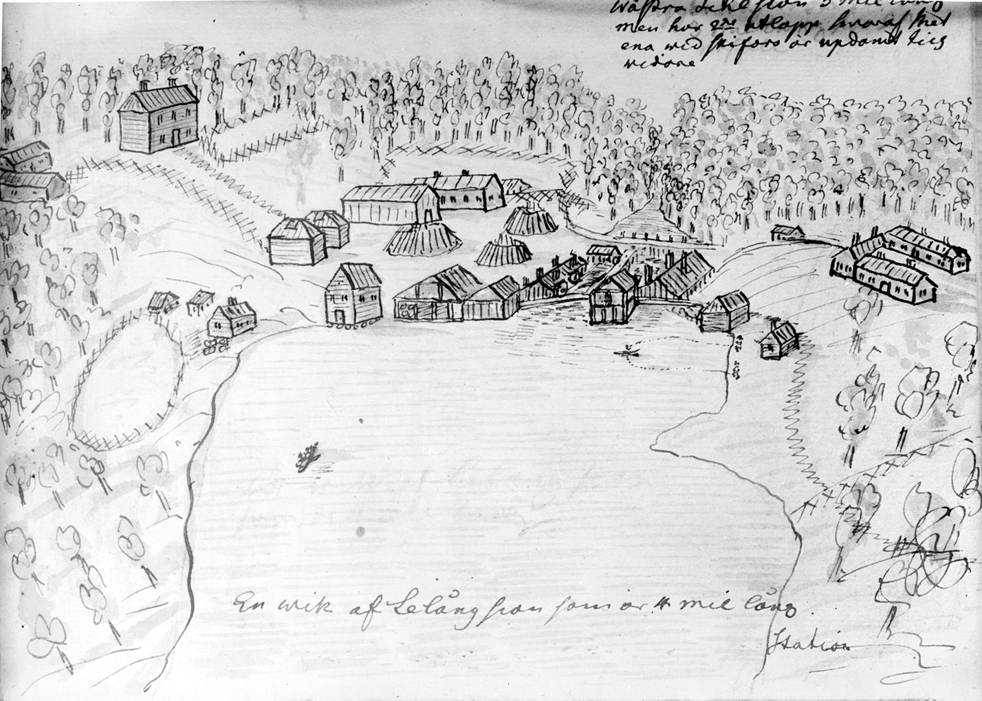 Gustafsfors Iron Works in Sweden, by Reinhold Angerstein 1750s